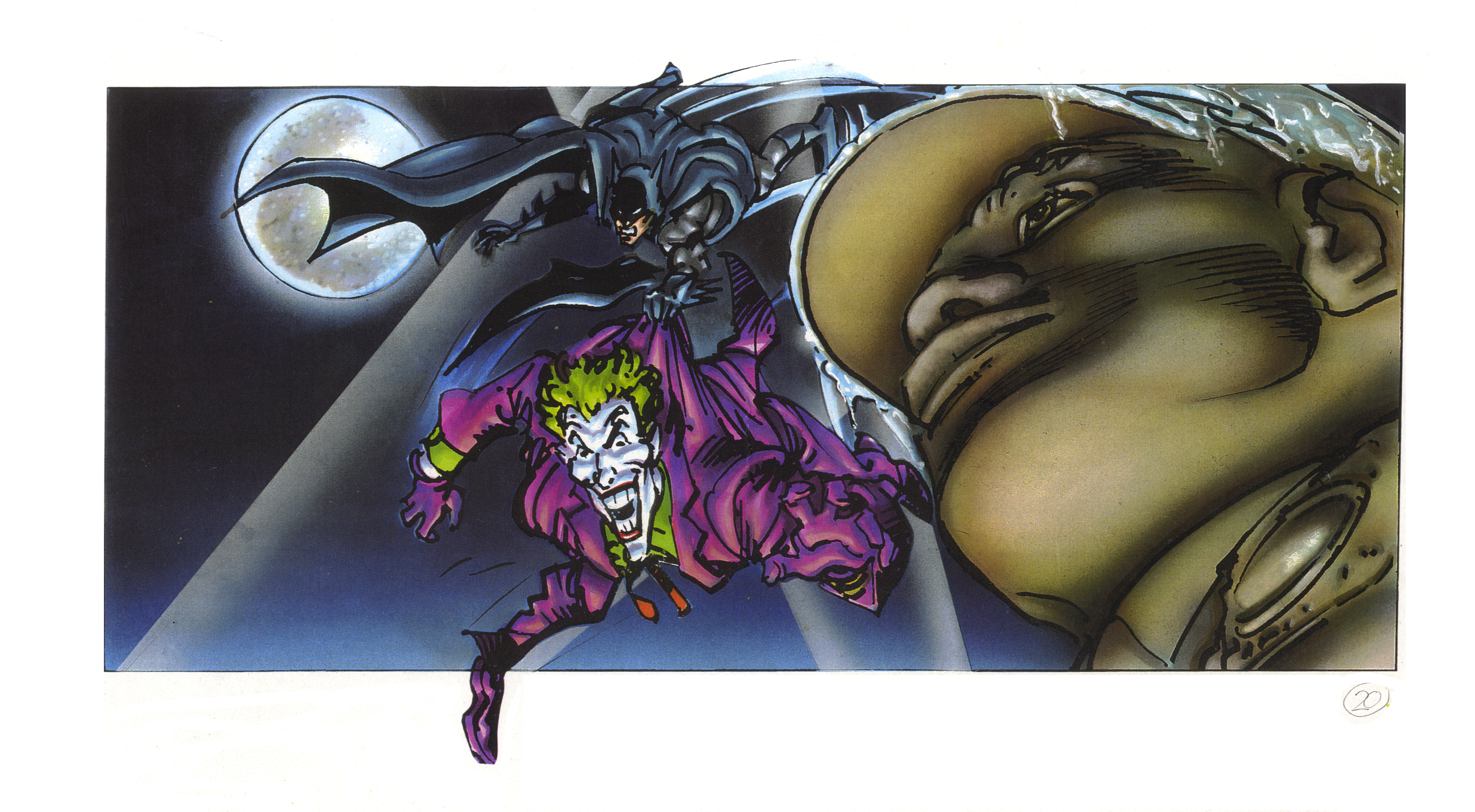 Batman key 20